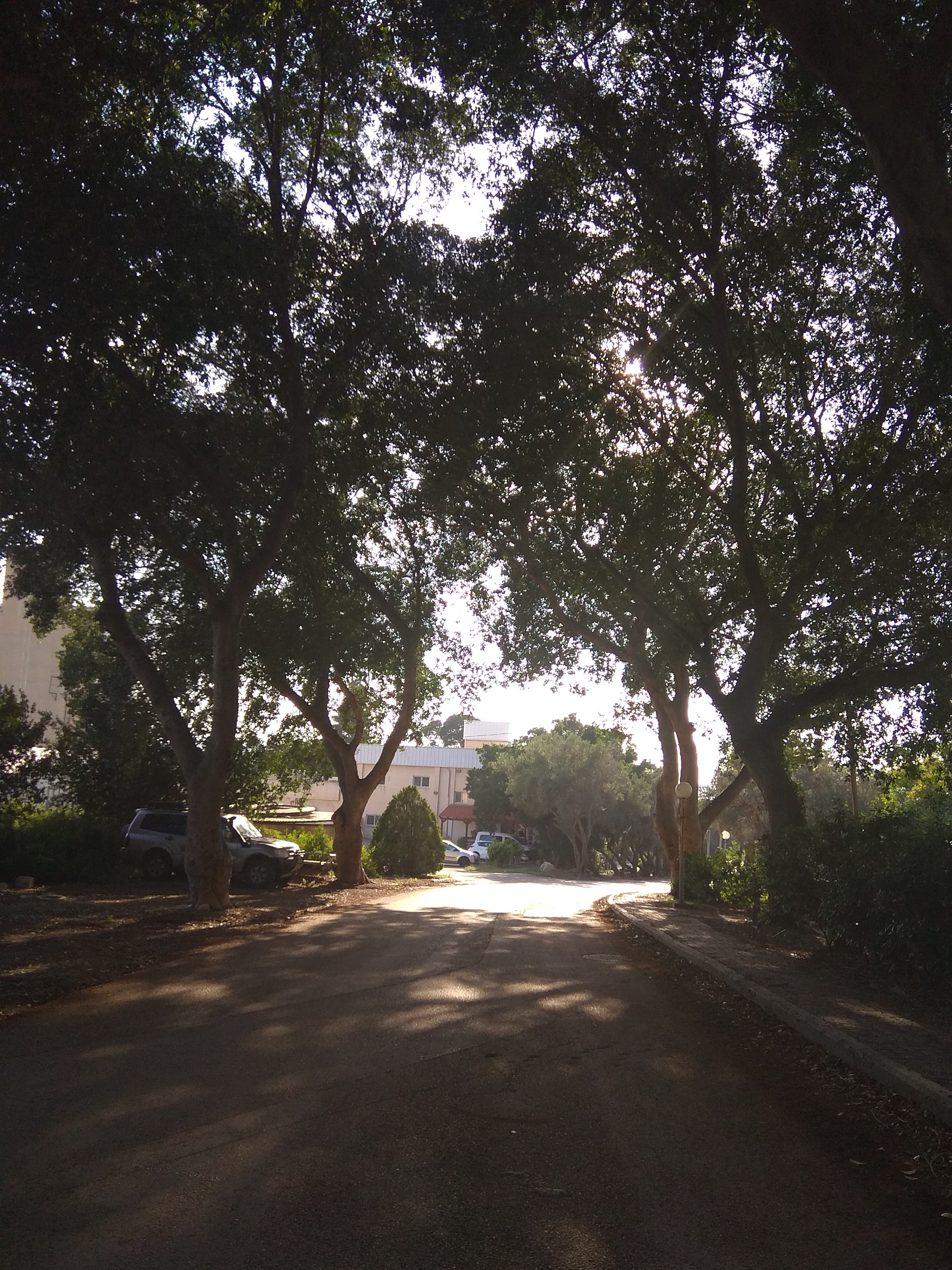 כביש בקיבוץ